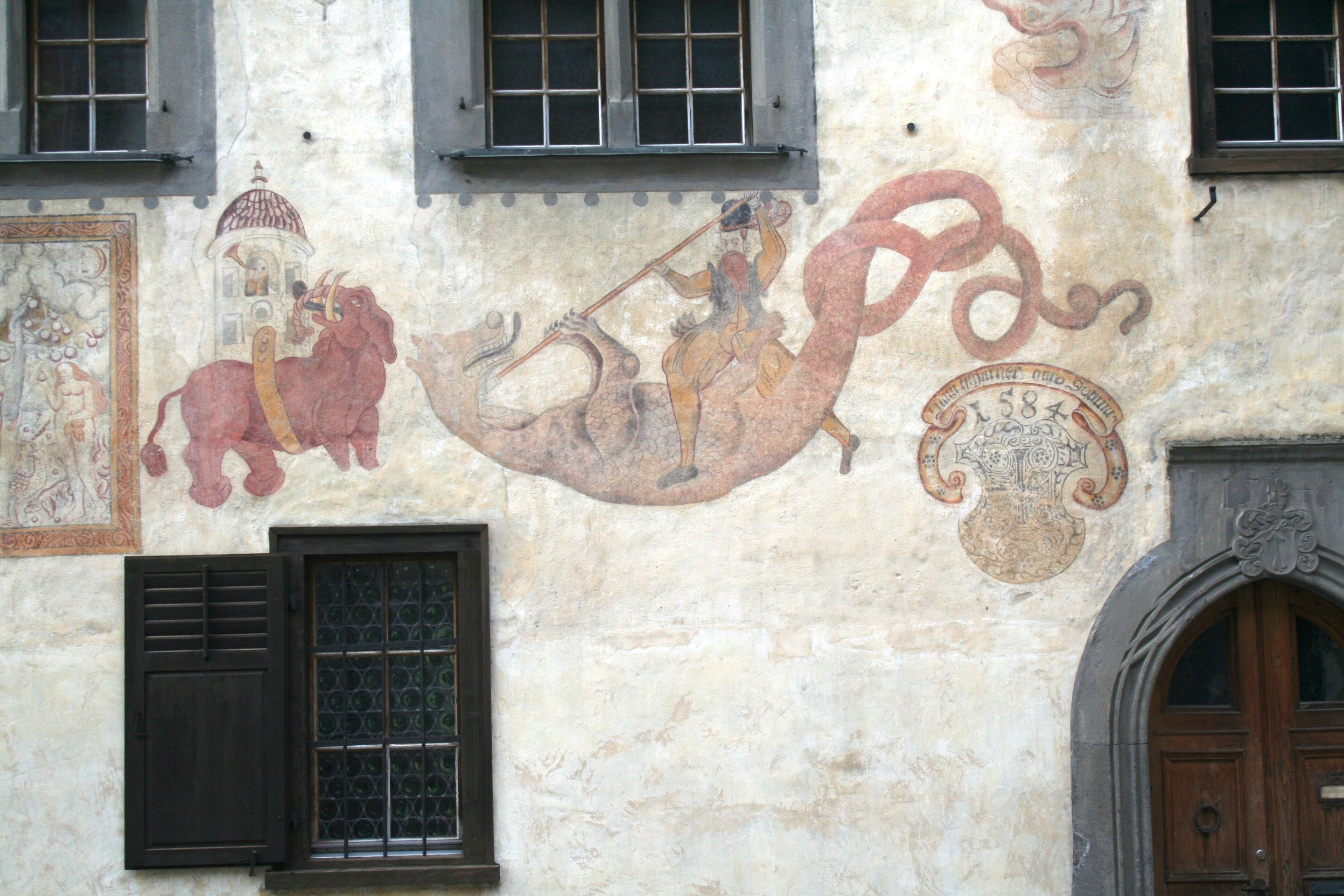 Haus Tscharner in Rothenbrunnen, bemalt von Hans Ardüser